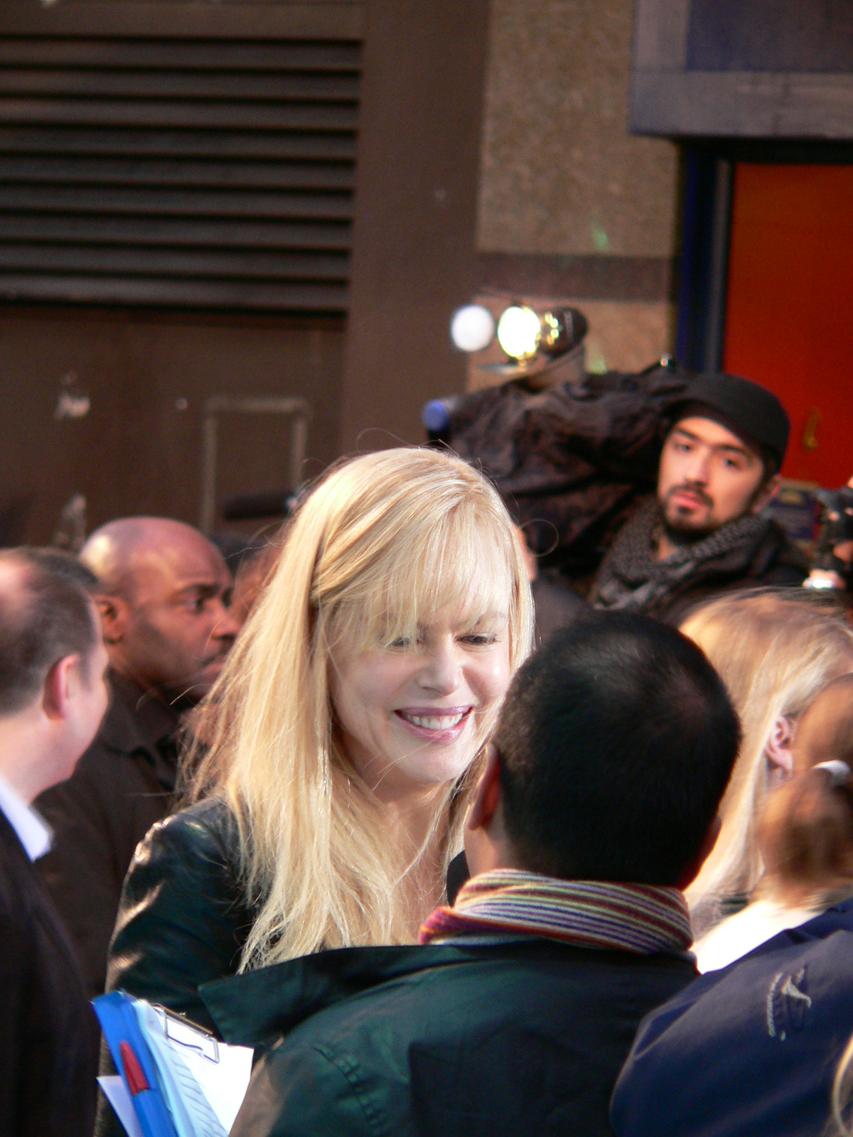 Nicole Kidman